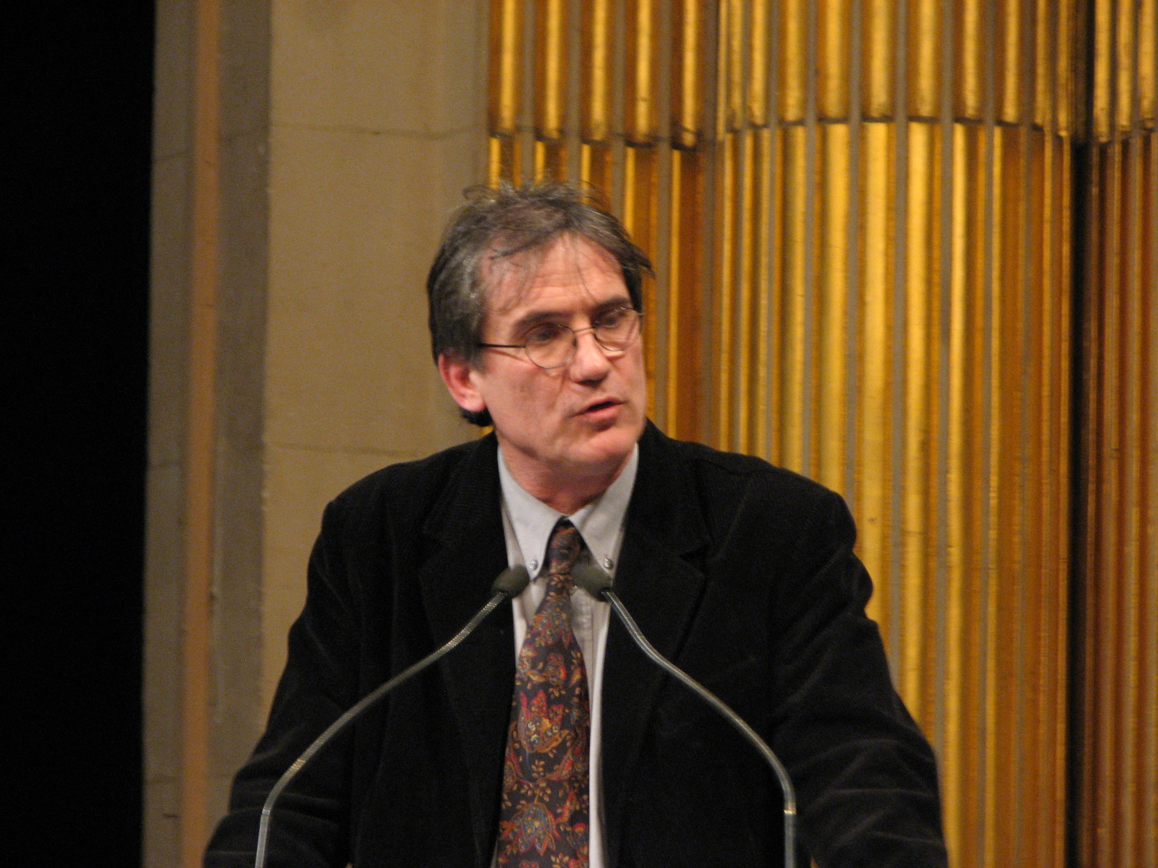 Marc Fontecave, membre du Collège de France et président du conseil scientifique de la ville de Paris, lors de la soirée "Paris de la Recherche"